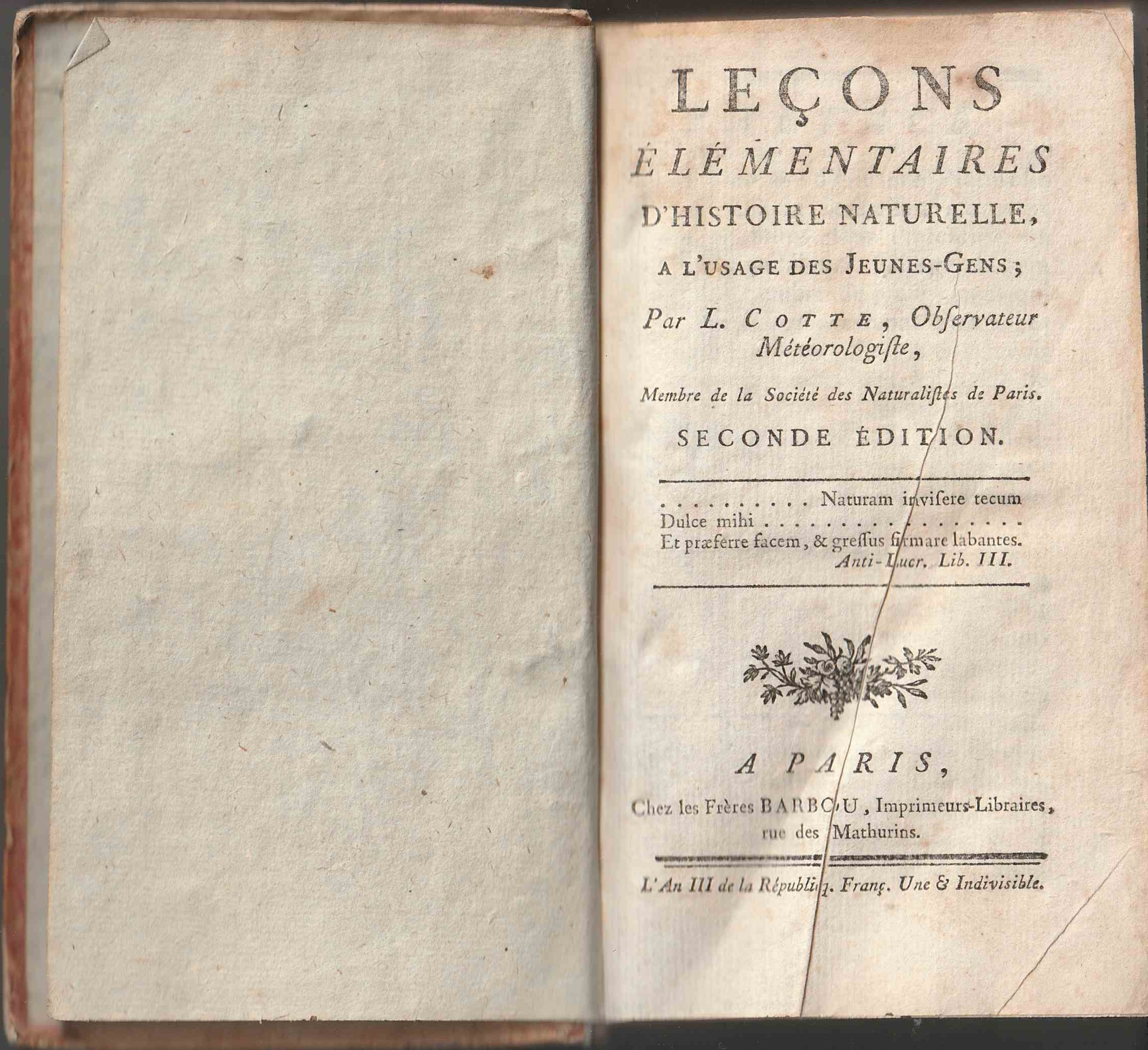 Un livre qui donne l'essentiel des sciences de la nature telles qu'elles étaient connues en 1795 : théorie de la terre, cosmologie, minéralogie, botanique, les insectes.